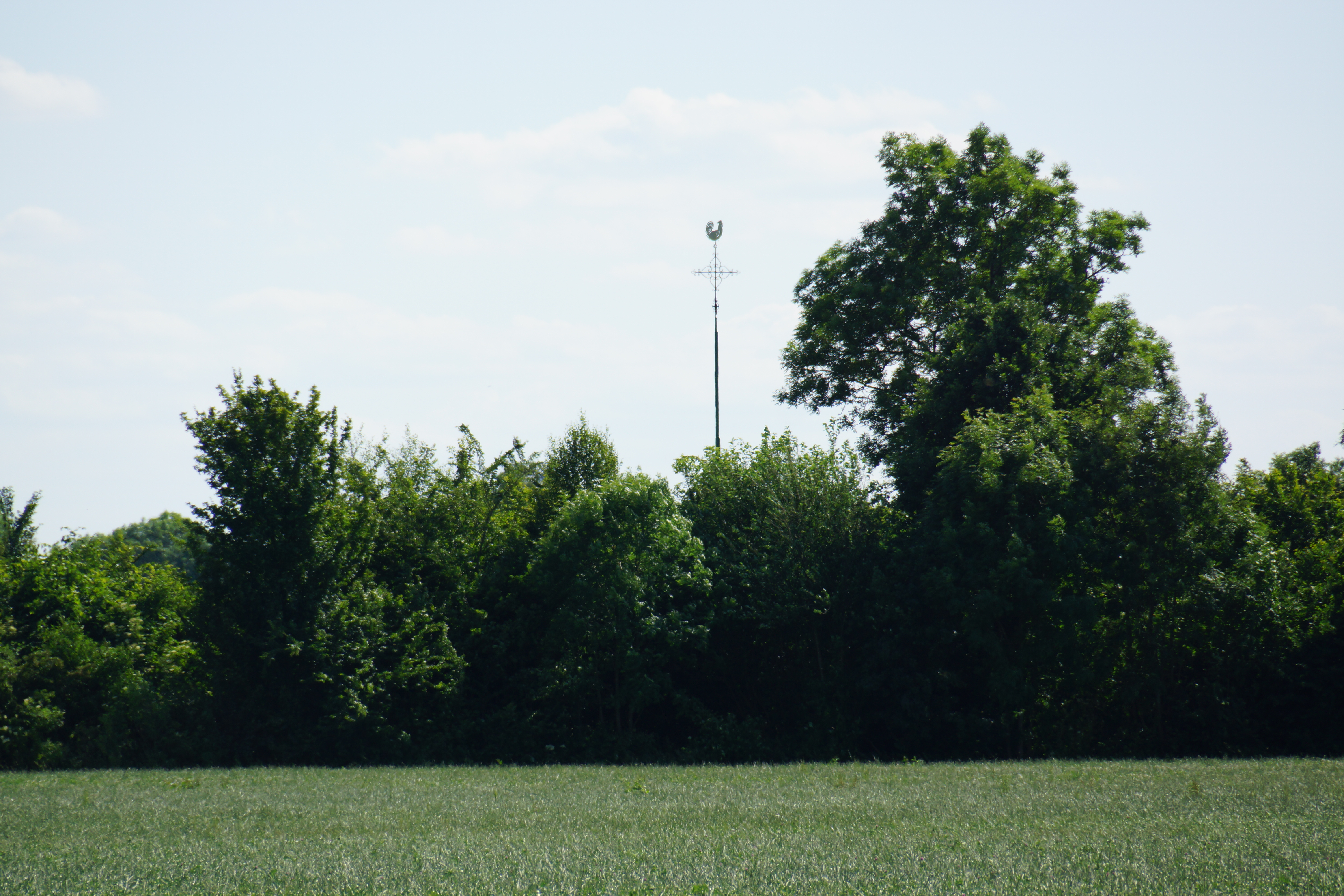 Vethuizen 150615 (12)